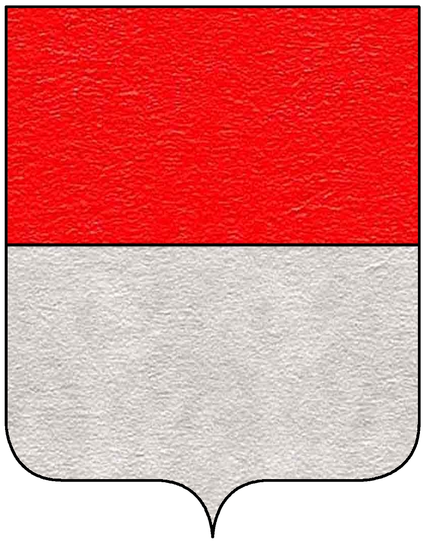 Stemma della famiglia Lanfranchi Chiccoli